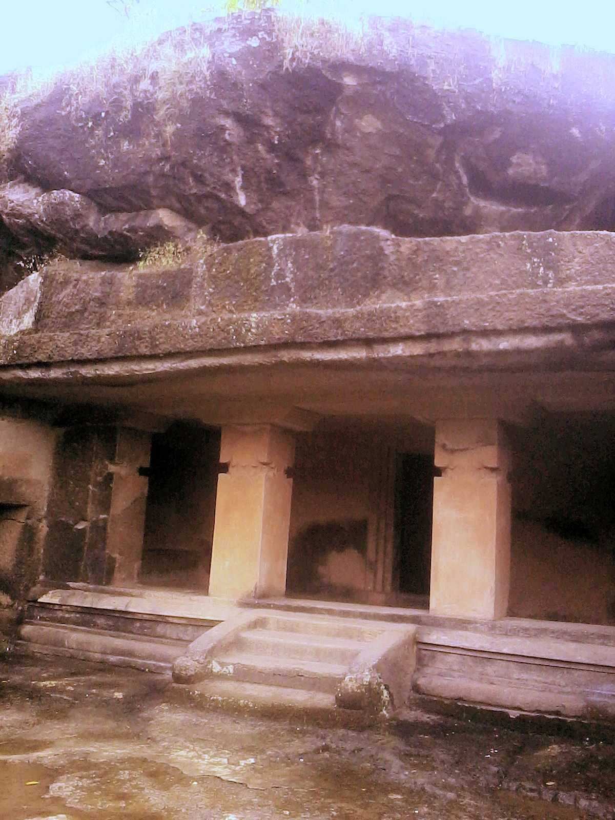 Kanheri Cave 34 [1]